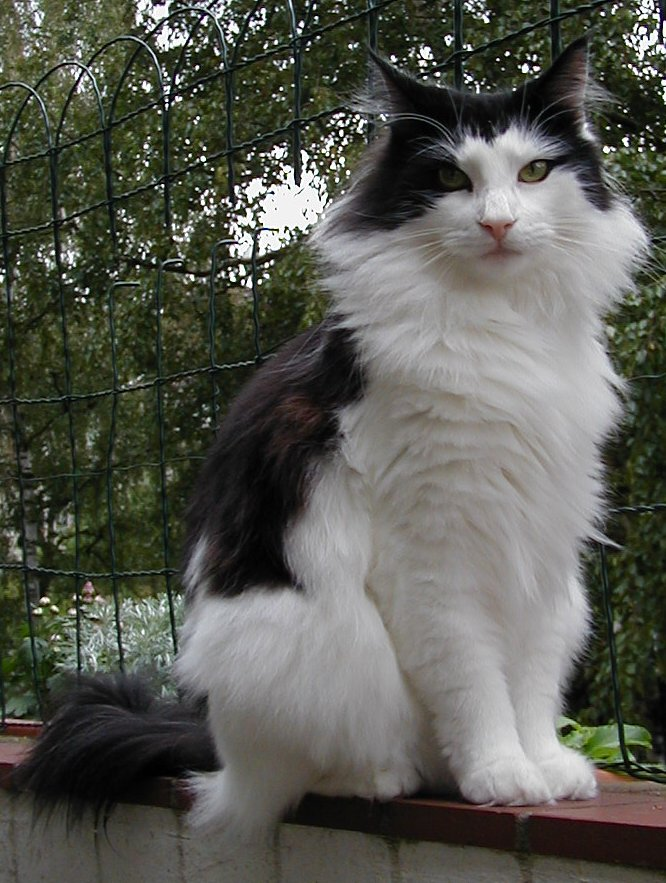 Norwegische Waldkatze, 15 Monate alter männlicher Kastrat, selbst fotografiert